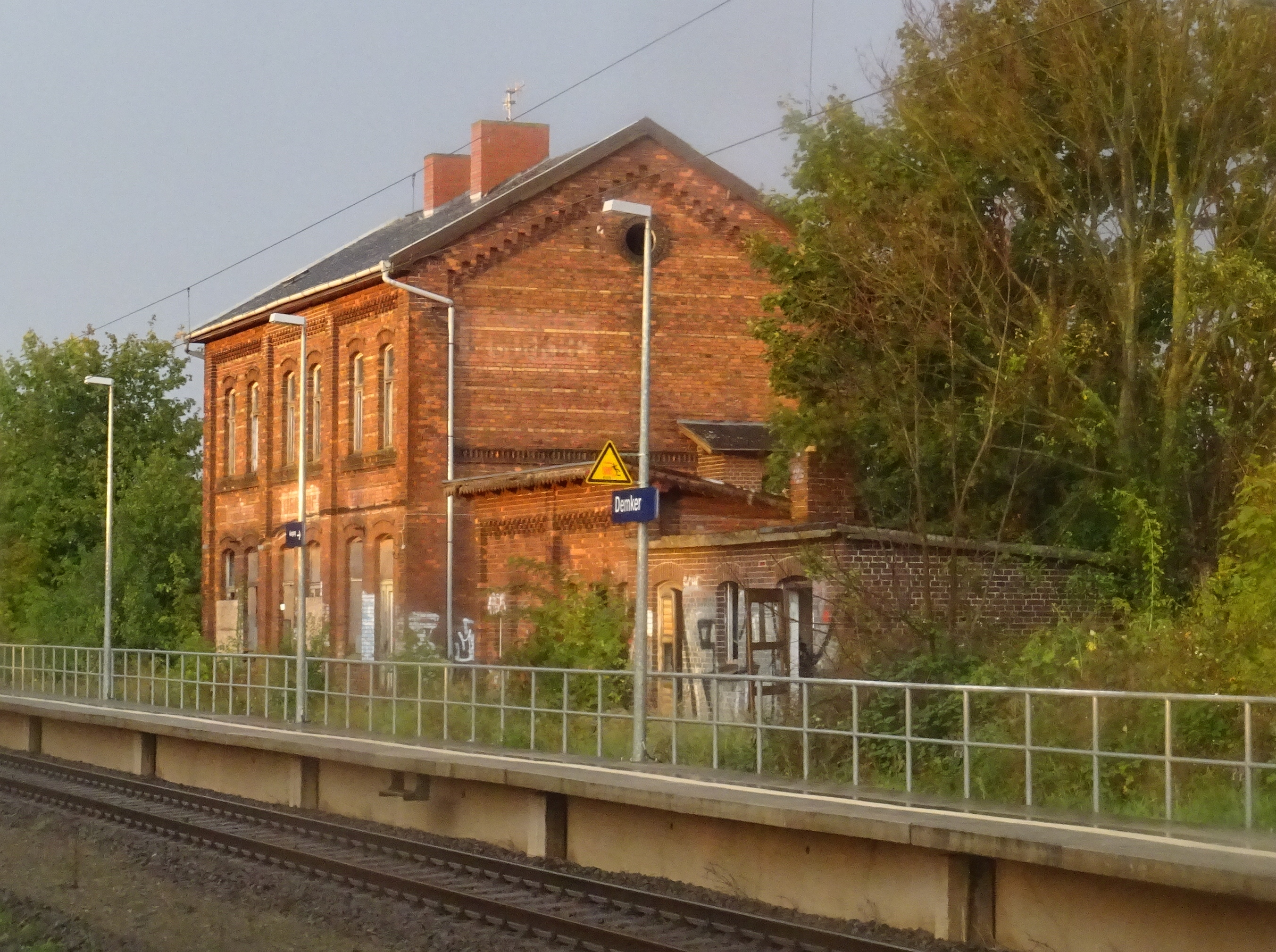 Bahnhof Demker, Blick von Südwesten auf das denkmalgeschützte Empfangsgebäude